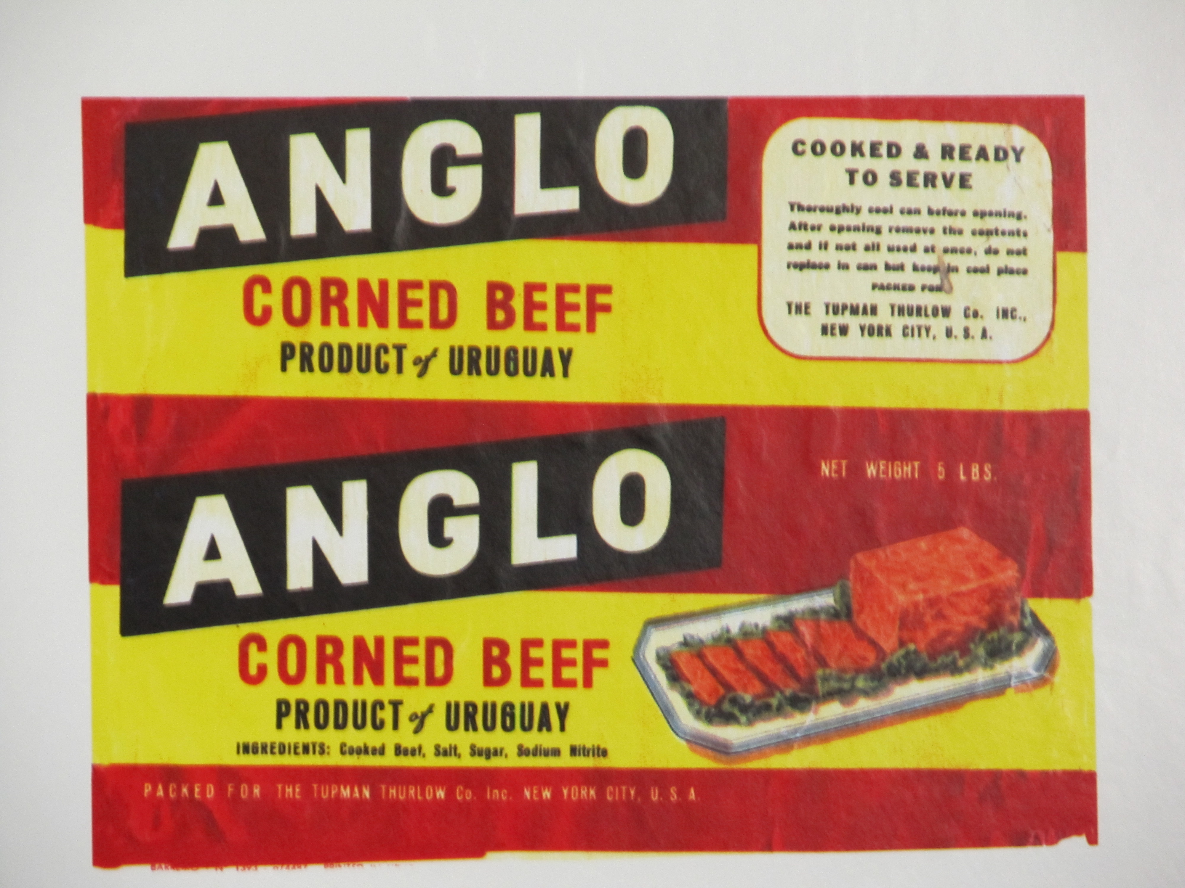 Complejo Industrial Anglo (instalación fabril y puerto) Barrio Anglo, La Pandilla, Zona del Golf, Camino de Tropa, Corrales, Zona de las Romerías Basurero Histórico, Zonas naturales: barrancas y espacios verdes. Ubicada en el departamento de Río Negro